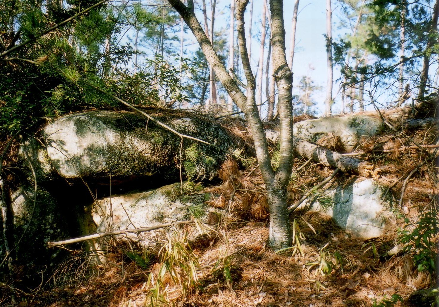 Sj-banyu1